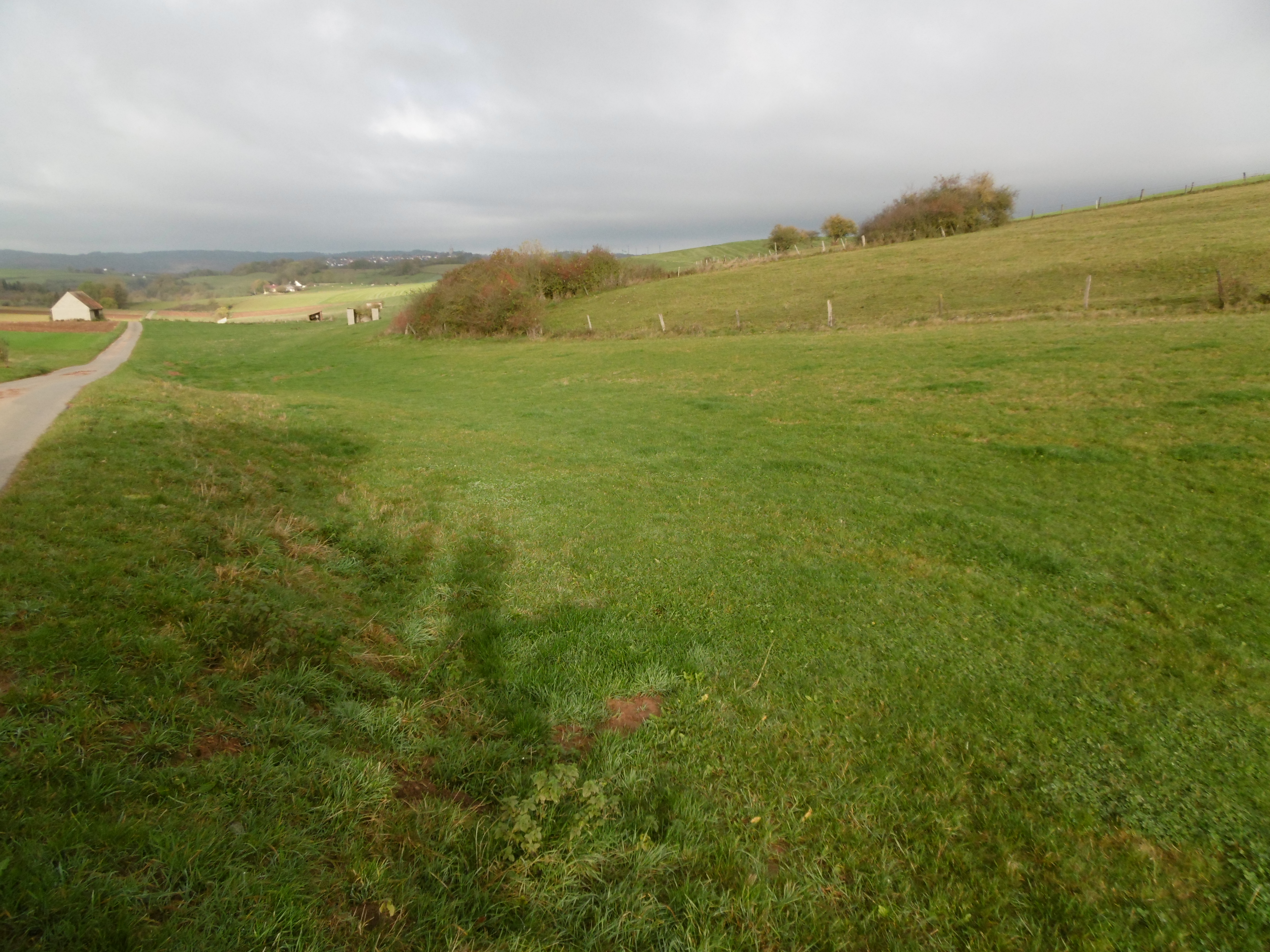 Landschaftsschutzgebiet Platte (Blick nach Westen auf Höhe der westlichsten Fichtenanpflanzung)